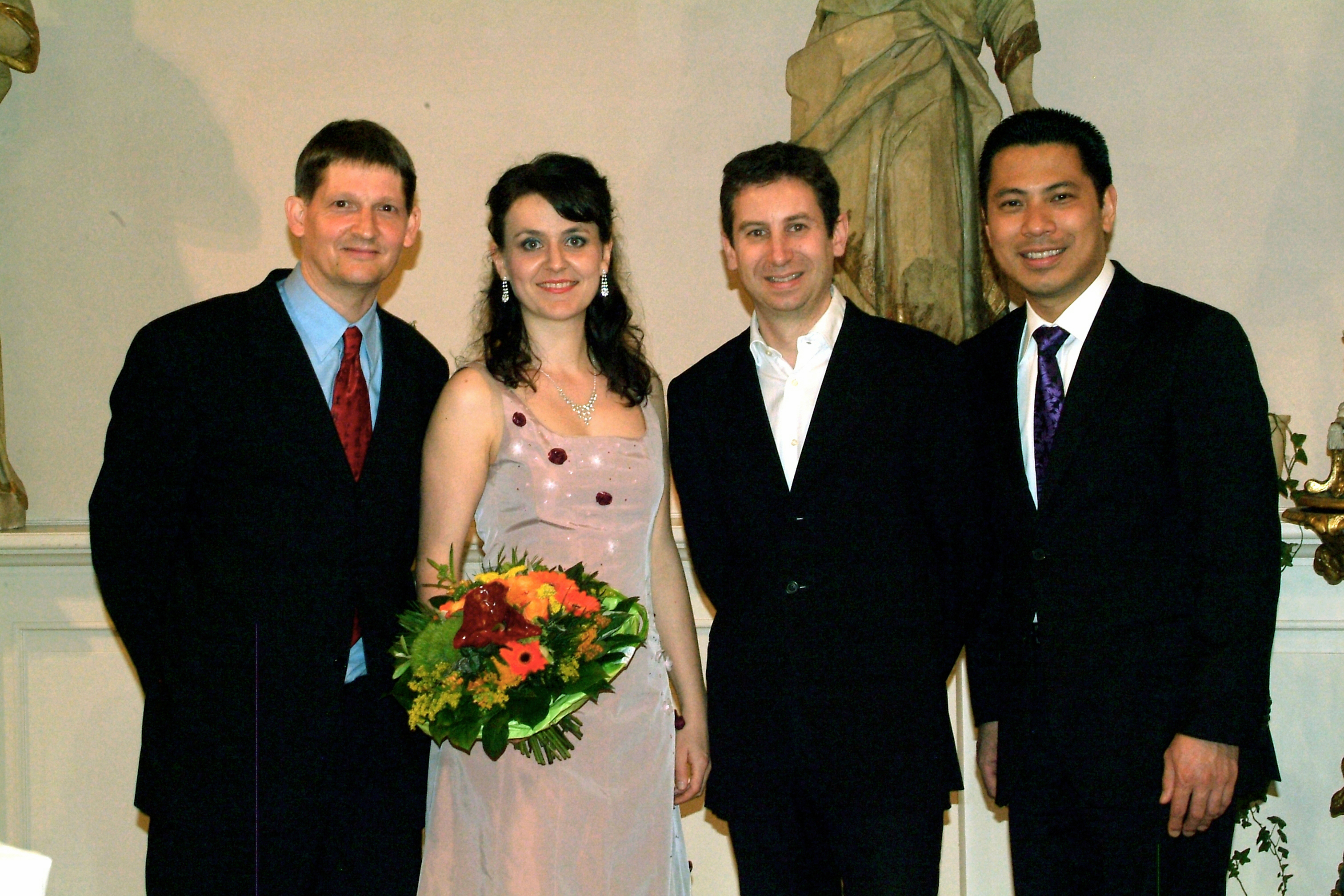 Lieder aus Leid in der Neustädter Kircher in Hannover; Momentaufnahmen aus der Abschluß-Veranstaltung von Hannover im Wort, Zeichen zun Gedenken an die nationalsozialistische Bücherverbrennung.